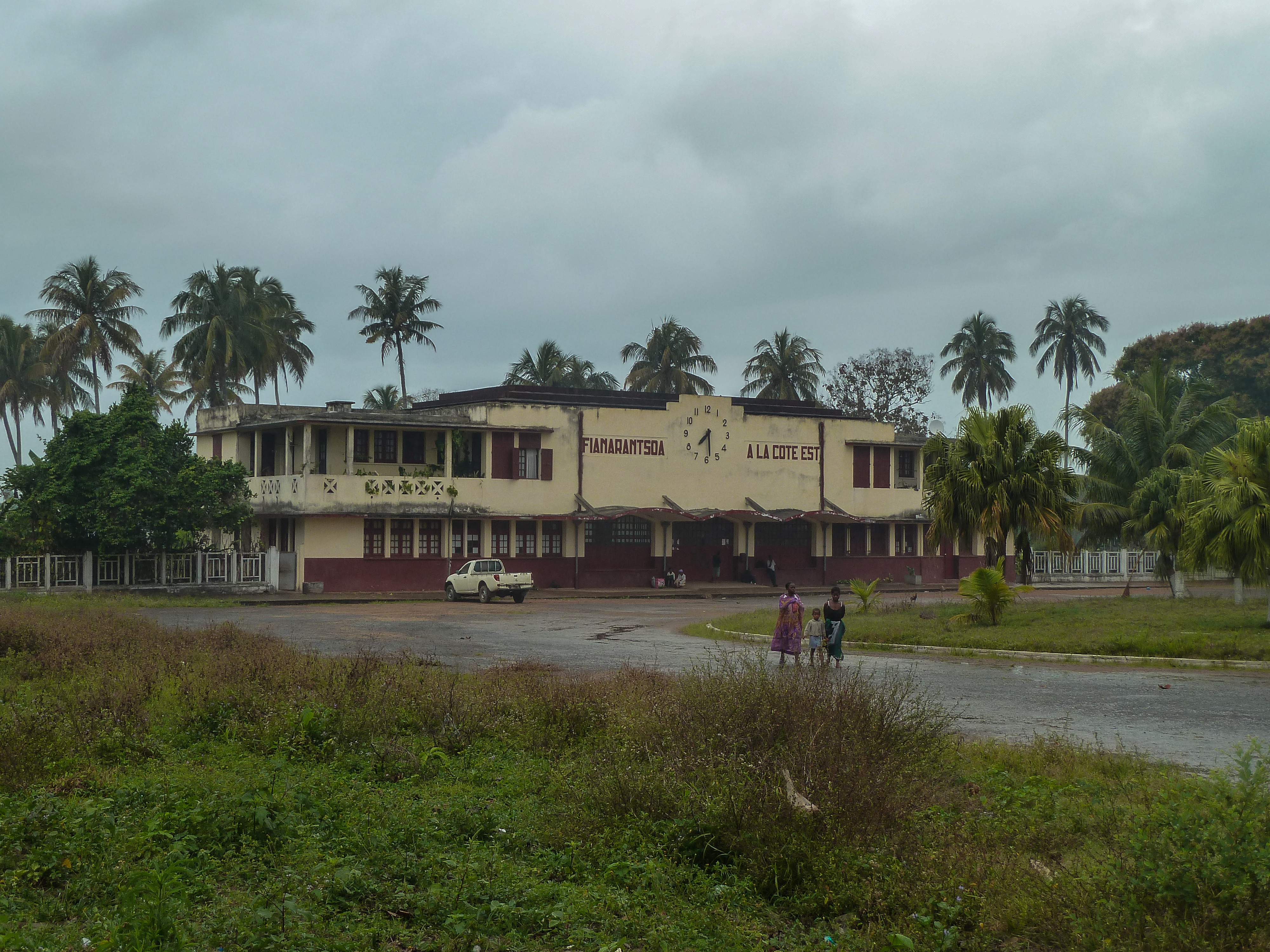 Treinstation van de FCE in Manakara